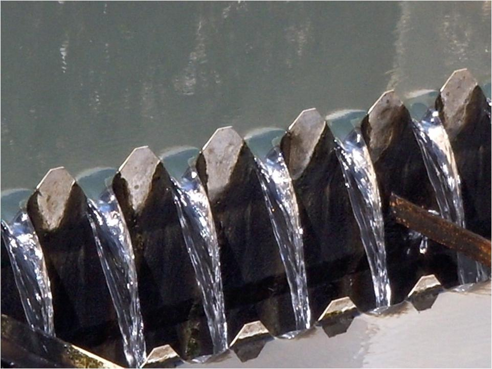 Detalle de un vertedero destinado a recoger las aguas del decantador para pasarlas a la etapa siguiente del tratamiento para alcanzar la potabilización